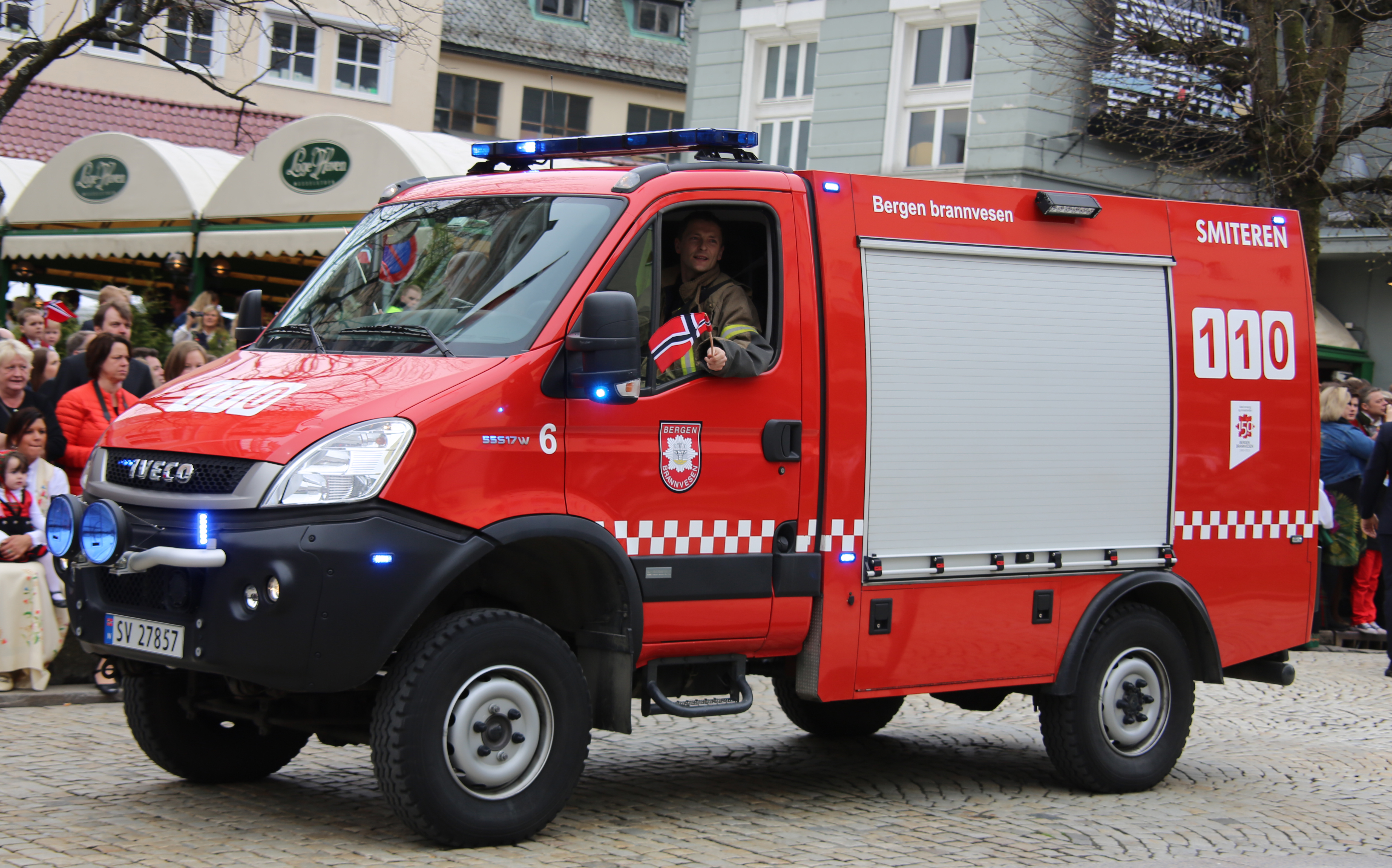 Bergen brannvesen